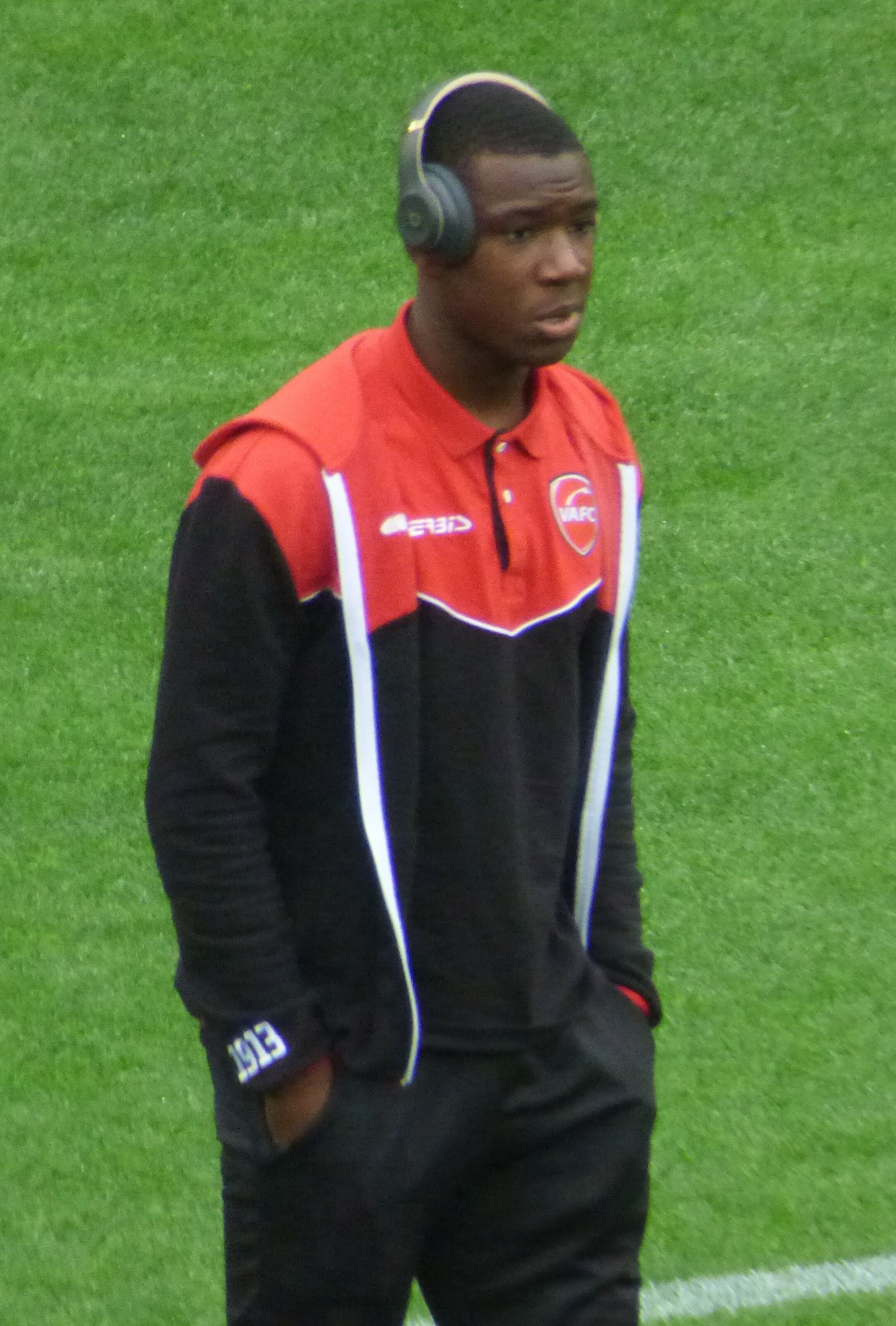 Sikou Niakaté avant le match Valenciennes FC / RC Lens, comptant pour la quatorzième journée du championnat de France de Ligue 2 2018-2019, le 10 novembre 2018, au Stade du Hainaut.